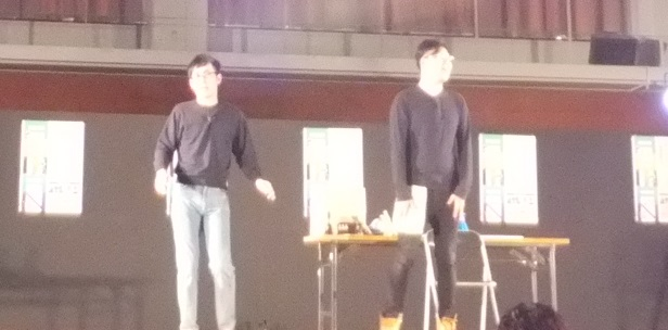 シソンヌ（お笑い芸人）（2013年10月27日）